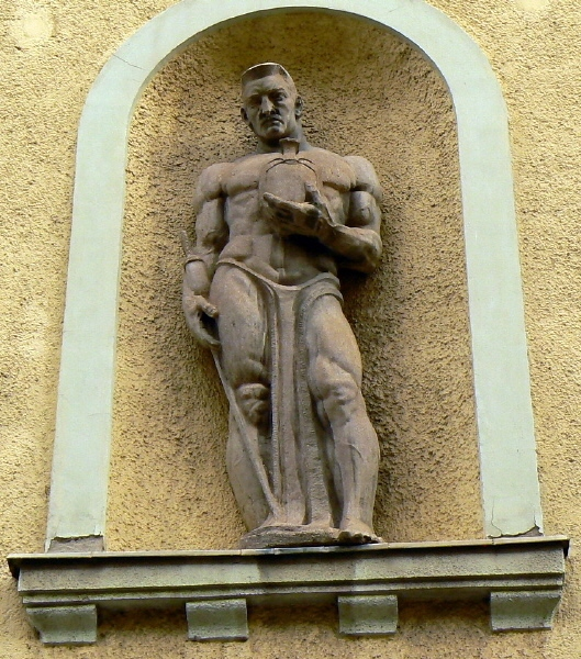 Tápai Antal, Üvegfúvók